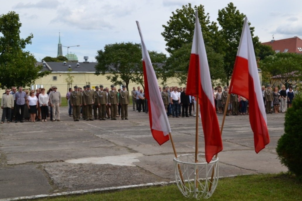 Pracownicy 15 WOG podczas uroczystości z okazji święta WP w 2014r.